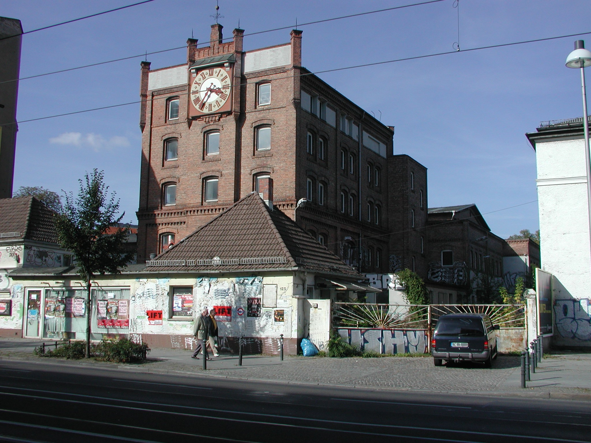 Berlin-Weißensee, Berliner Allee 123: Hauptgebäude der früheren Brauerei